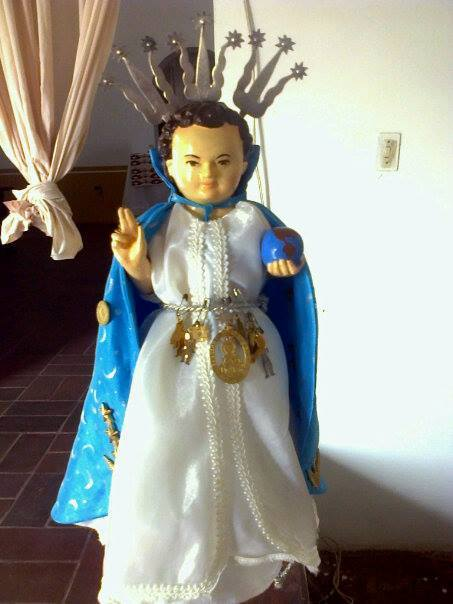 Esta imagen, de aproximadamente 35cm. es conocida popularmente como el Niño Pascualito o Niño Parrandero. Recorre las casas vecinas en las comunidades cercanas de Caigua desde mediados de noviembre,en sentido Este-Oeste.El 24 de diciembre en horas de la tarde regresa a la iglesia, donde es vestido y en la misa de nochebuena es colocado en el pesebre.